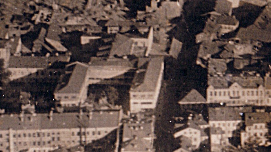 Беларуская (тарашкевіца): Менск (Miensk), скрыжаваньне вуліц Зборавай (vulica Zboravaja) і Фэліцыянаўскай (vulica Felicyjanaŭskaja). Аэрафотаздымак